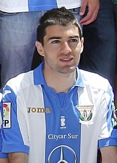 Felicidades pepineros!! Vuestro ascenso a Primera es la historia de un sueño, el resultado de vuestro trabajo y esfuerzo. Sois un orgullo para todo Madrid! Enhorabuena CD Leganés. #LeganésEsDePrimera